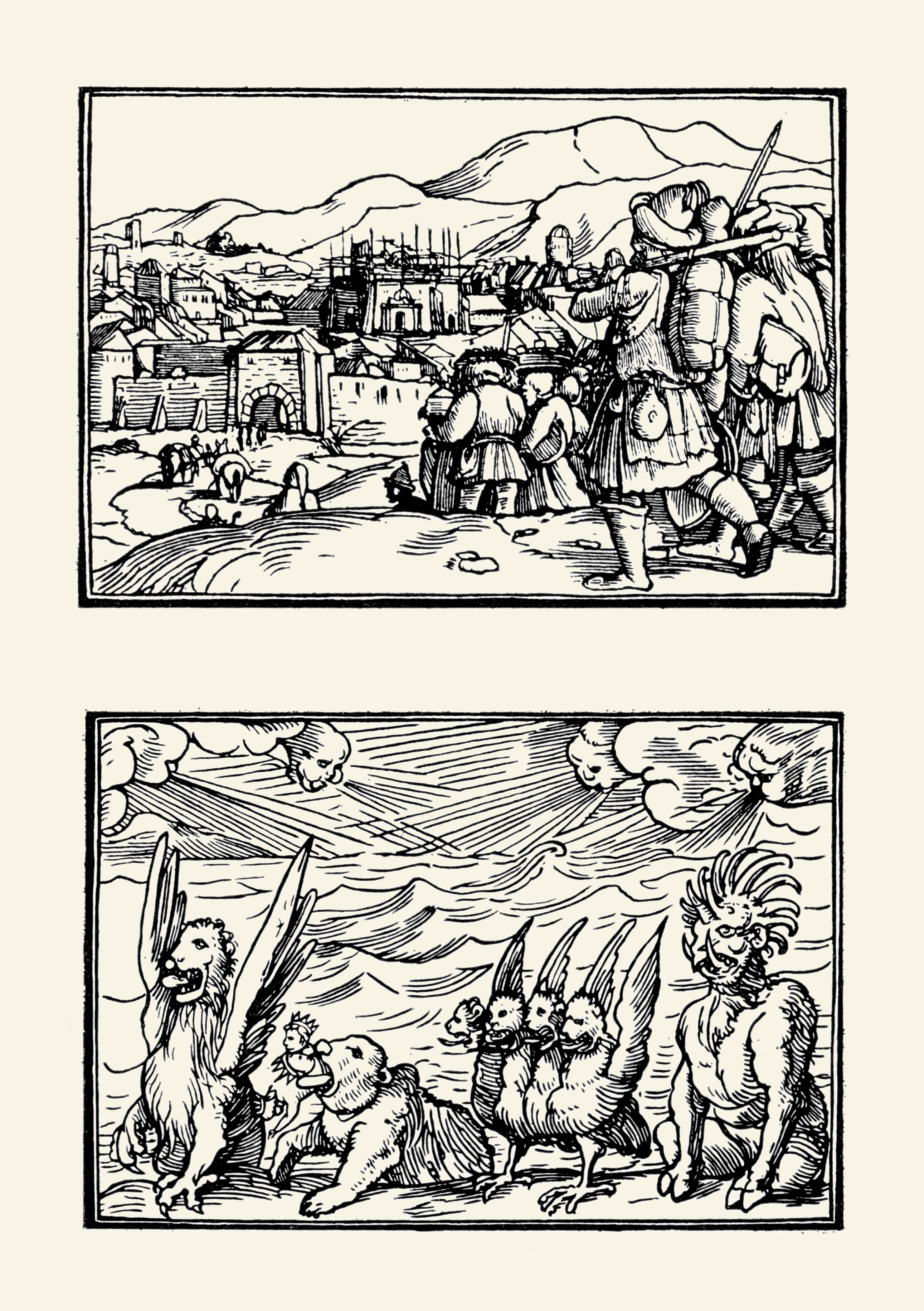 копия 2-х гравюр Ганса Гольбейна Младшего. Иллюстрации к Ветхому завету. 1530